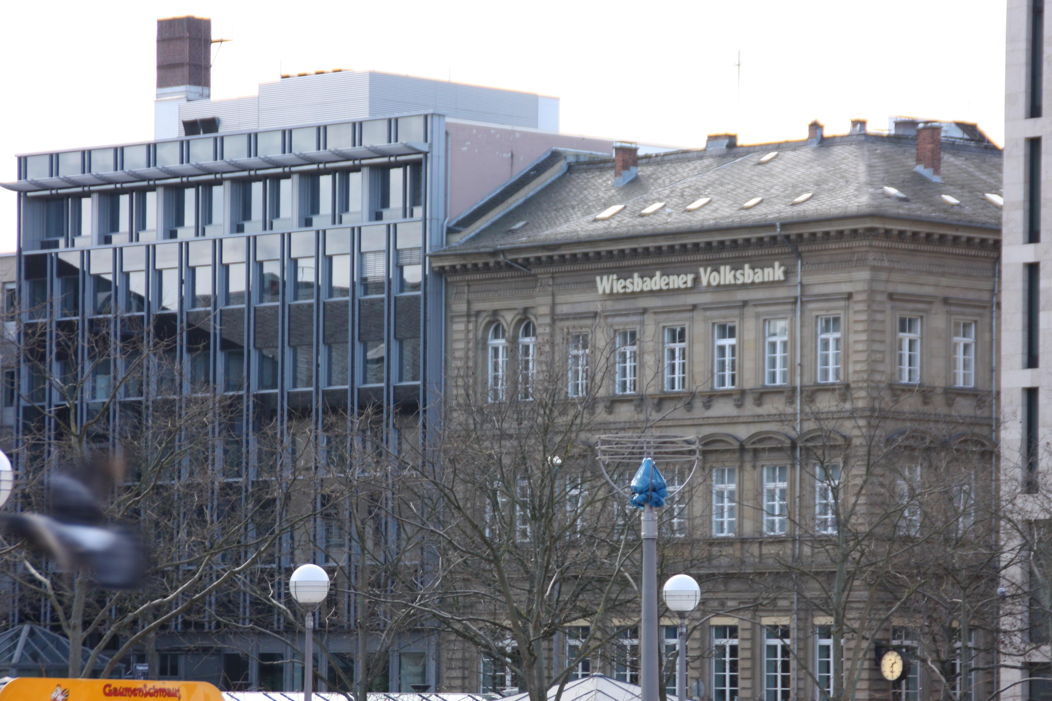 Die Zentrale der Wiesbadener Volksbank in Wiesbaden, Hessen, Deutschland